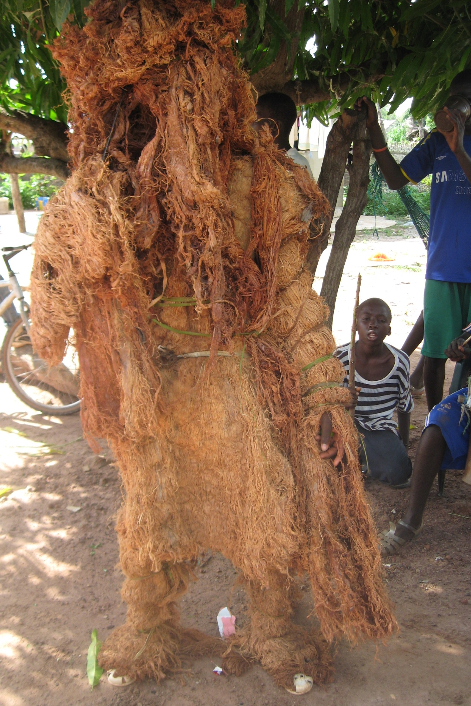 Konkoran (ou kankouran) à Kounkane en Haute-Casamance (Sénégal)